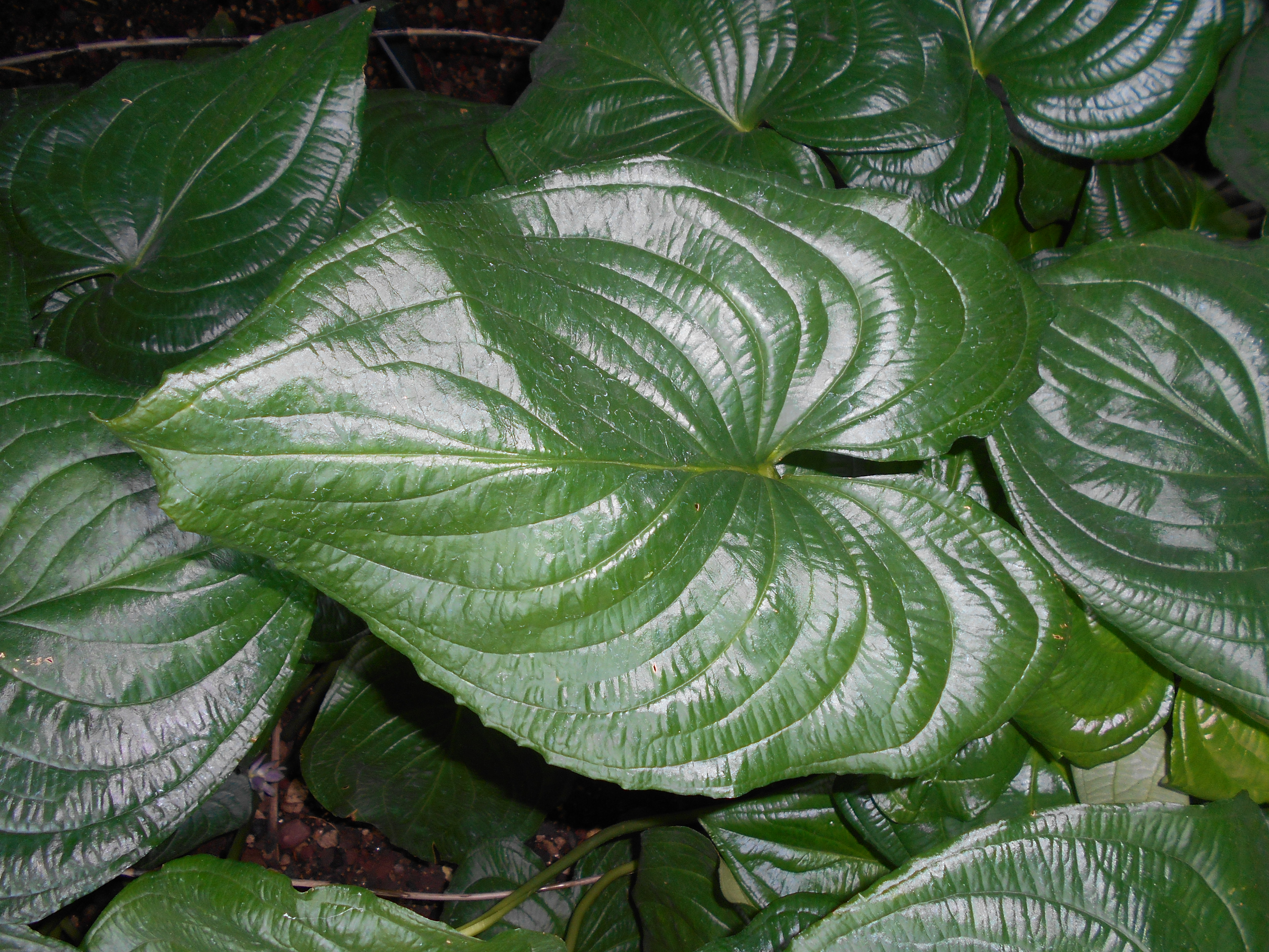 Cyanastrum cordifolium, Botanischer Garten Berlin.